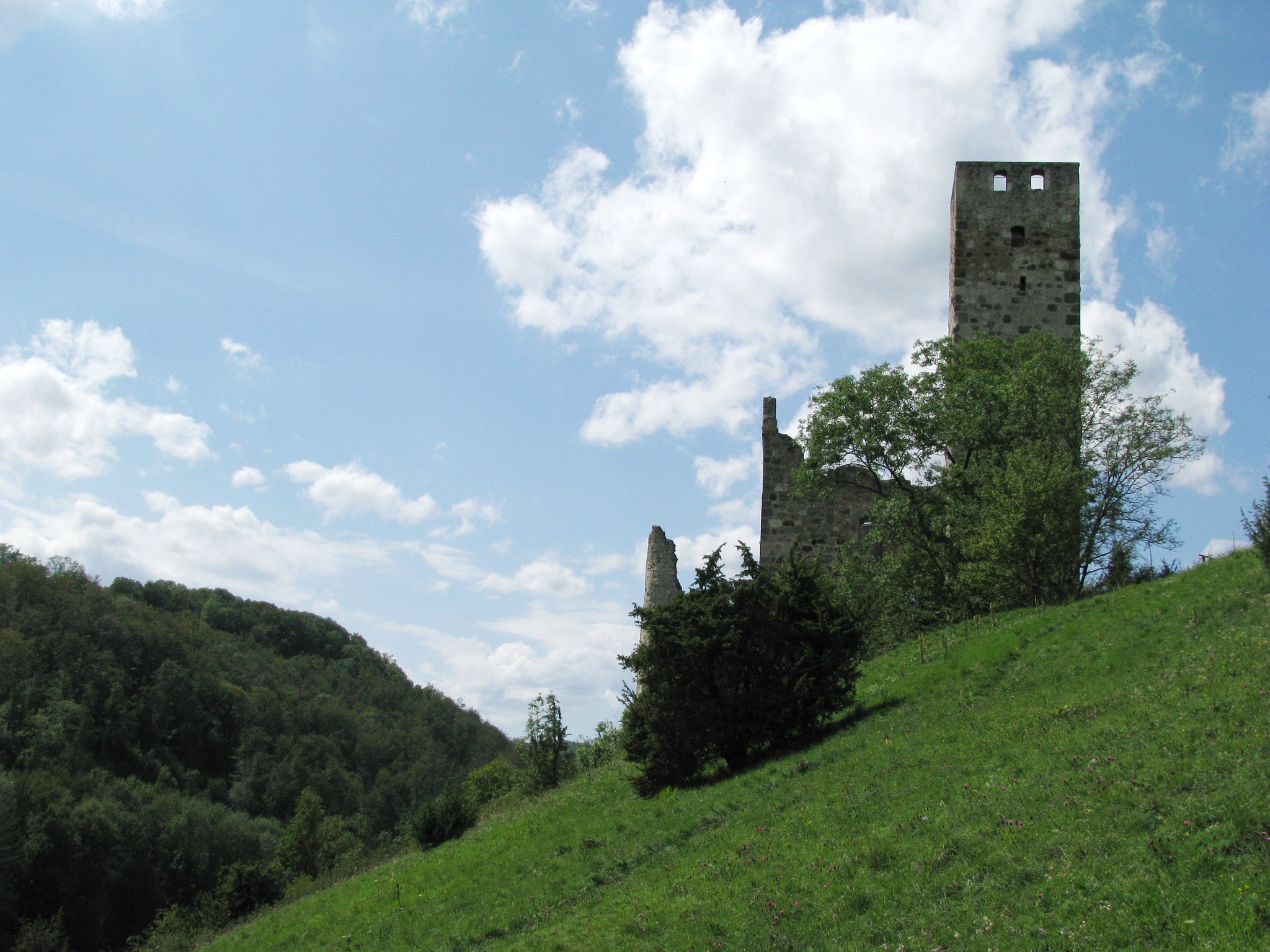 Burgruine Niederhaus; Ansicht von Osten